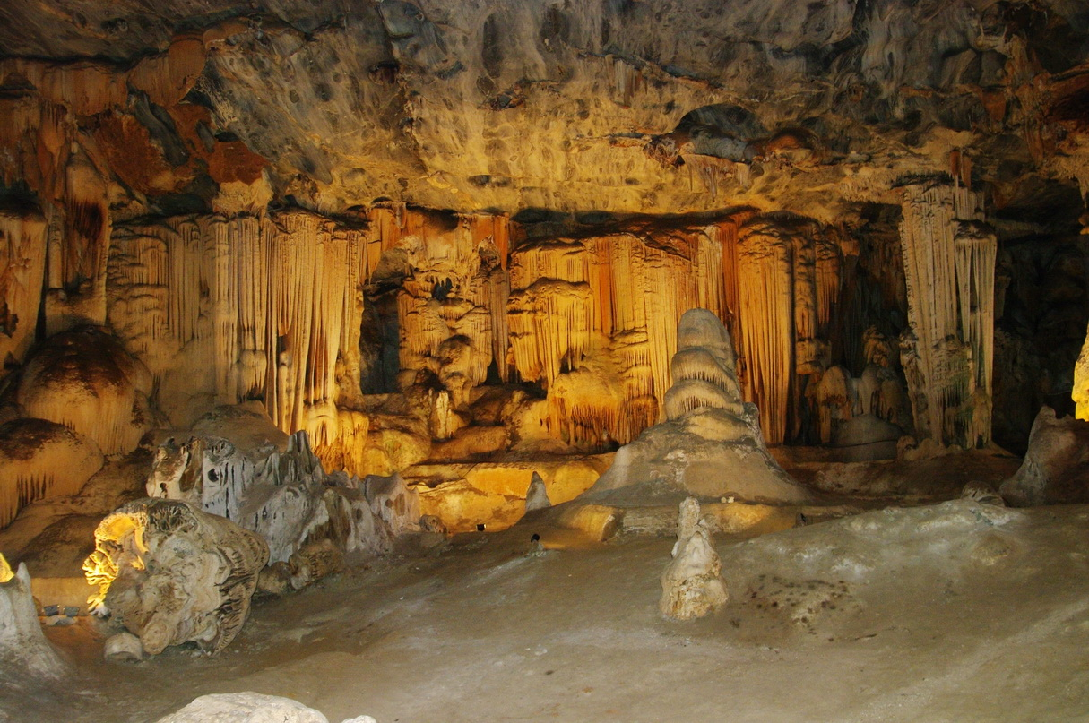 In den Cango Caves